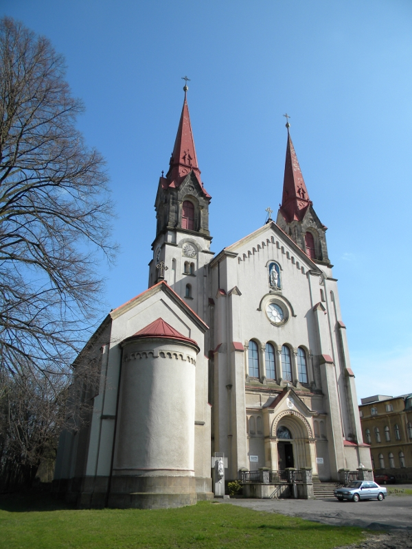 Bazilika Filipov, Na vyhlídce, Jiříkov-Filipov, Děčín, Česká republika